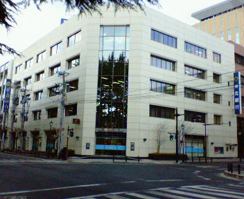 東北銀行 本店（店番：101）